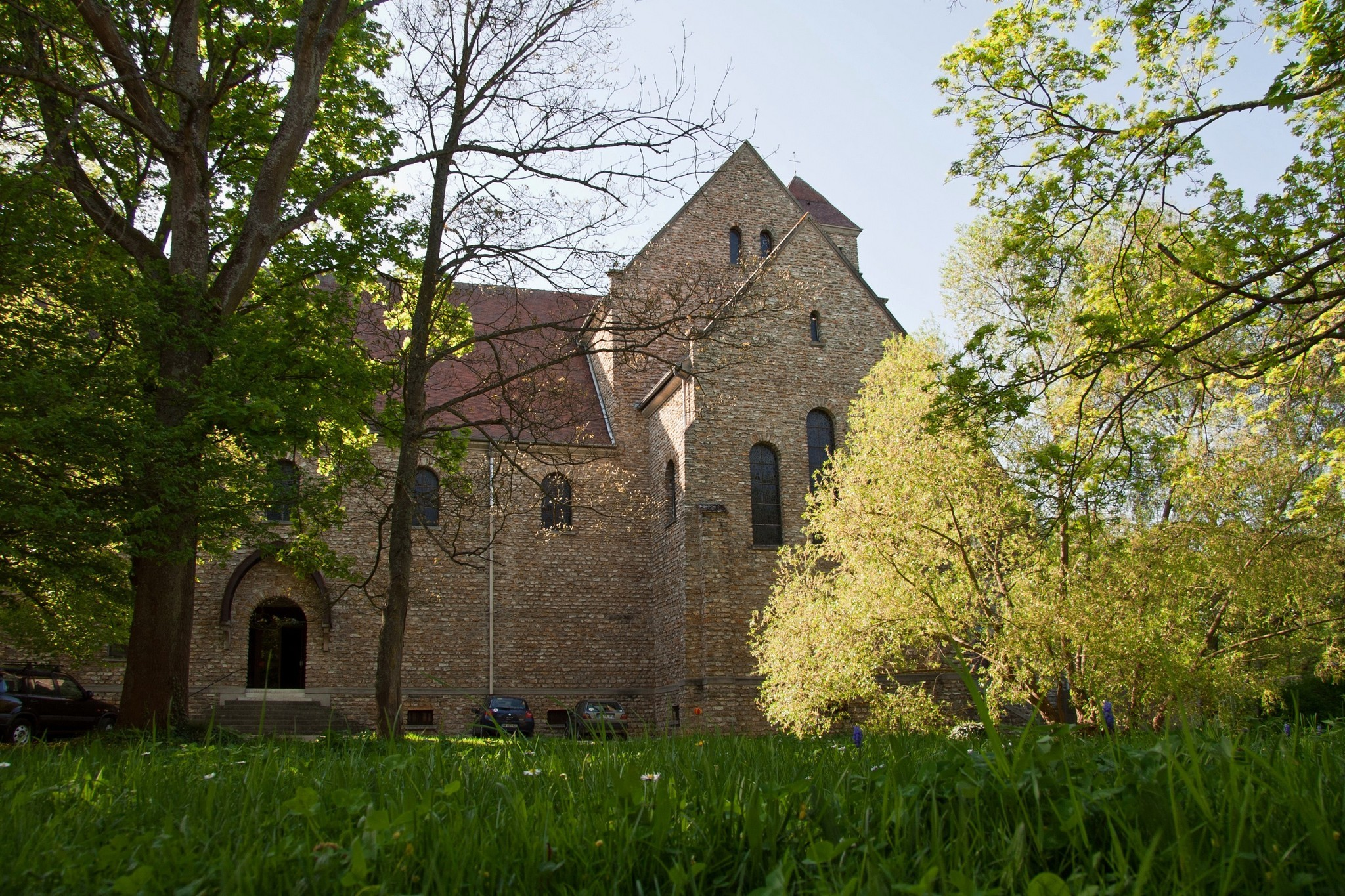 L'abbaye de Vauhallan (91)